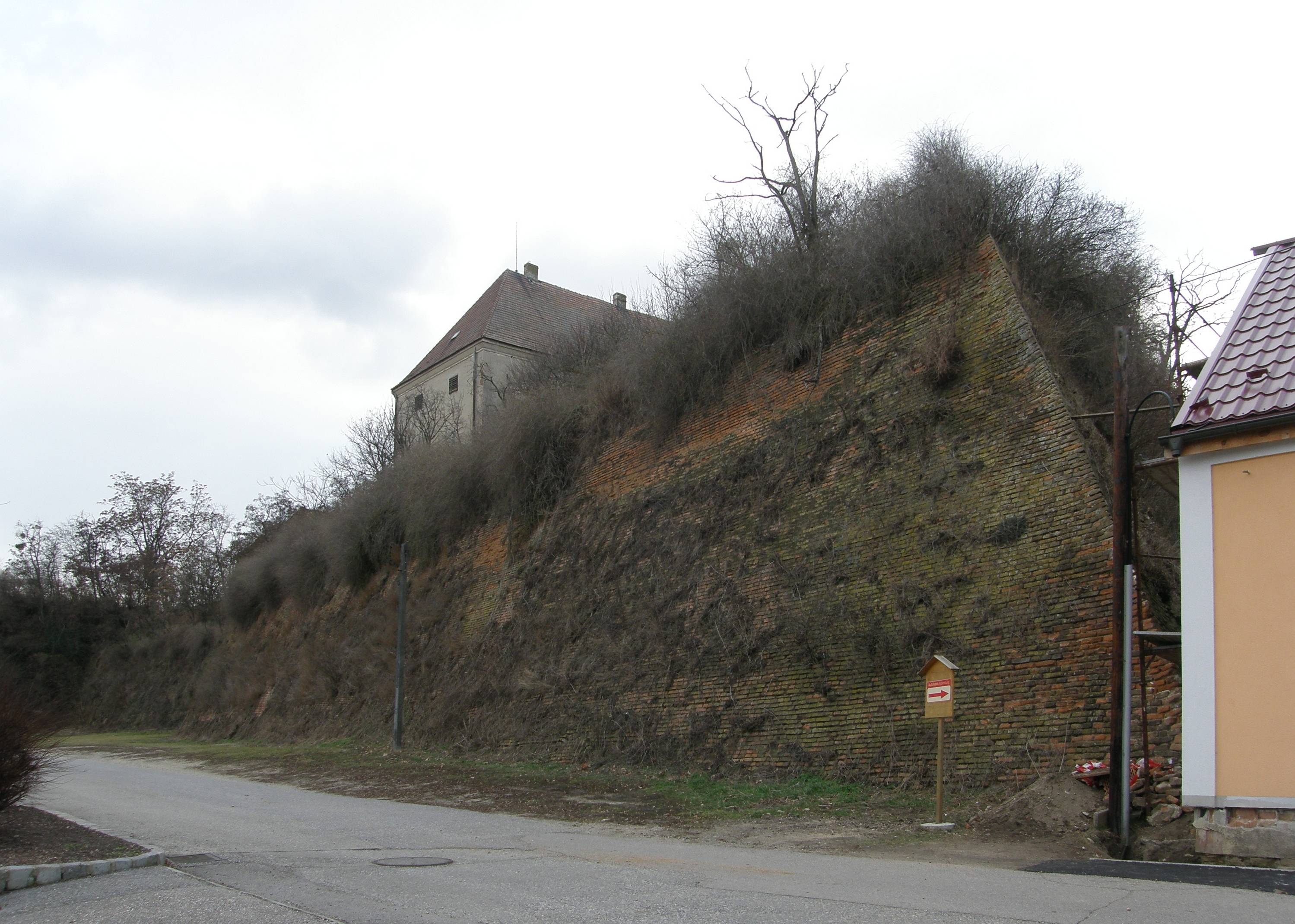 Schloss Rabensburg Ansicht der Basteien